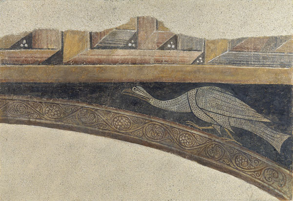 Conjunto decorativo de pinturas al fresco traspasadas a lienzo procedentes de Arlanza. Hacia 1210 conservadas en el Museo Nacional de Arte de Cataluña. Barcelona. Spain